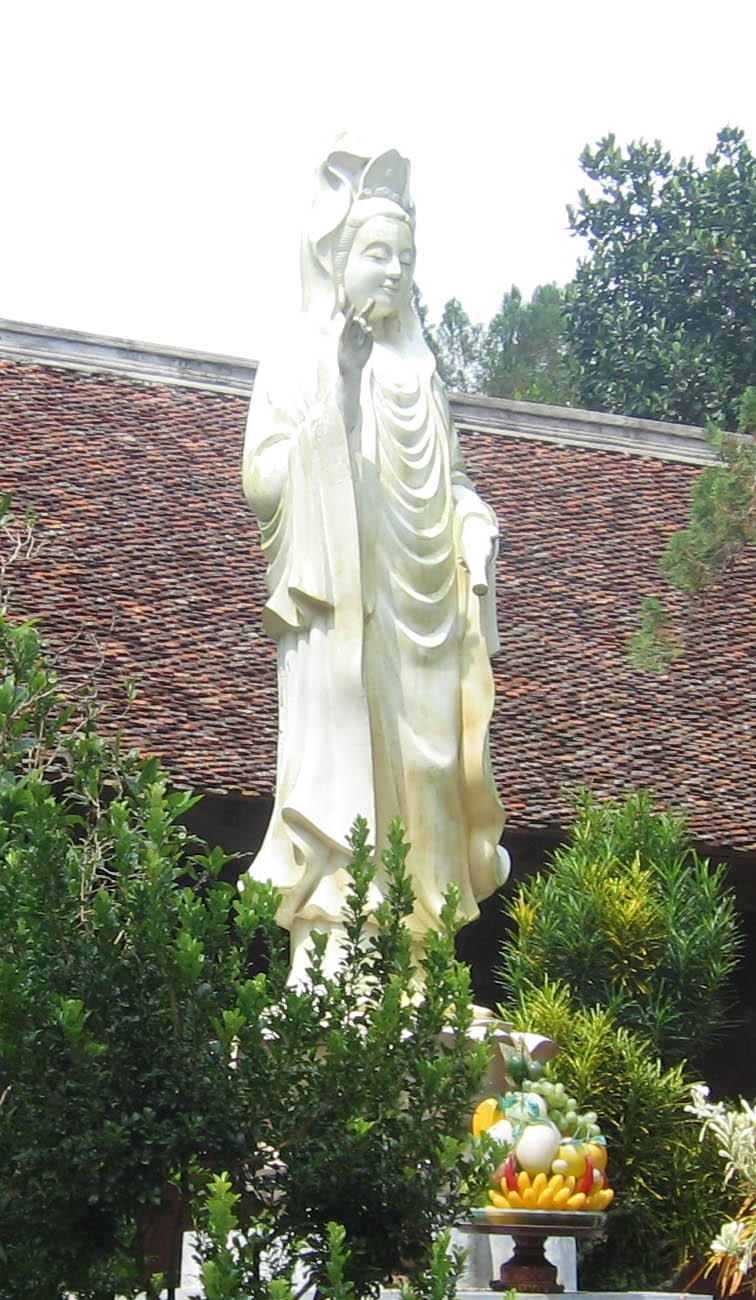 Tượng Quán Thế Âm trong khuôn viên chùa Bổ Đà